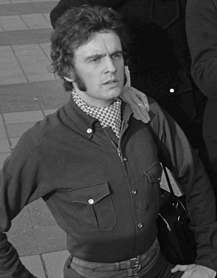 Beroemde modeontwerpers waren aanwezig zijn P. en C. modeshow 100-jarig bestaan in RAI. Herrgard, Gilbey, Esterel 15 oktober 1969